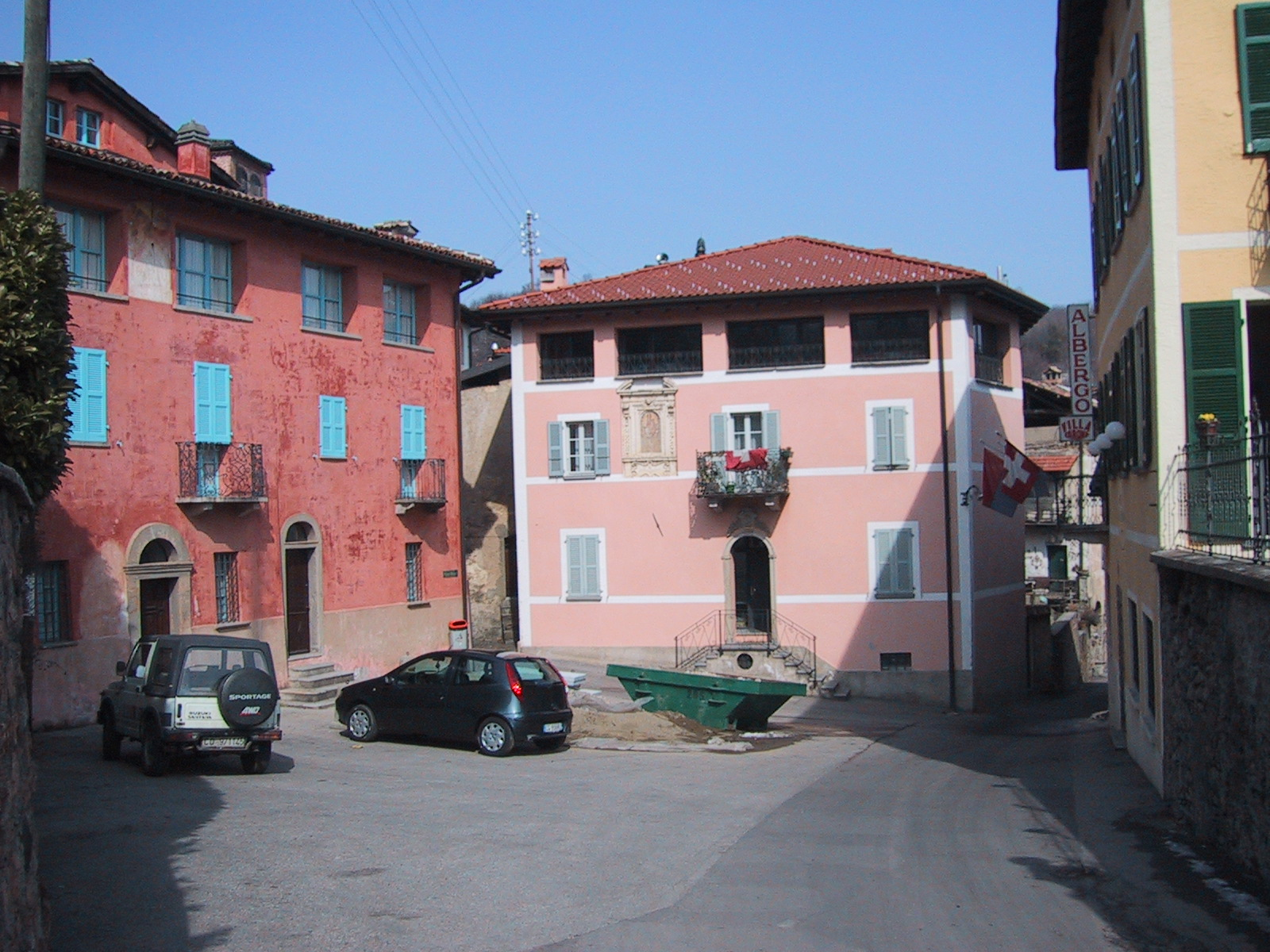 Carona, ein Dorfplatz, Tessin, Aufnahme vom 11.März 2005. Fotograf Peter Berger (selbst fotografiert). Lizenzstatus "GNU-FDL"